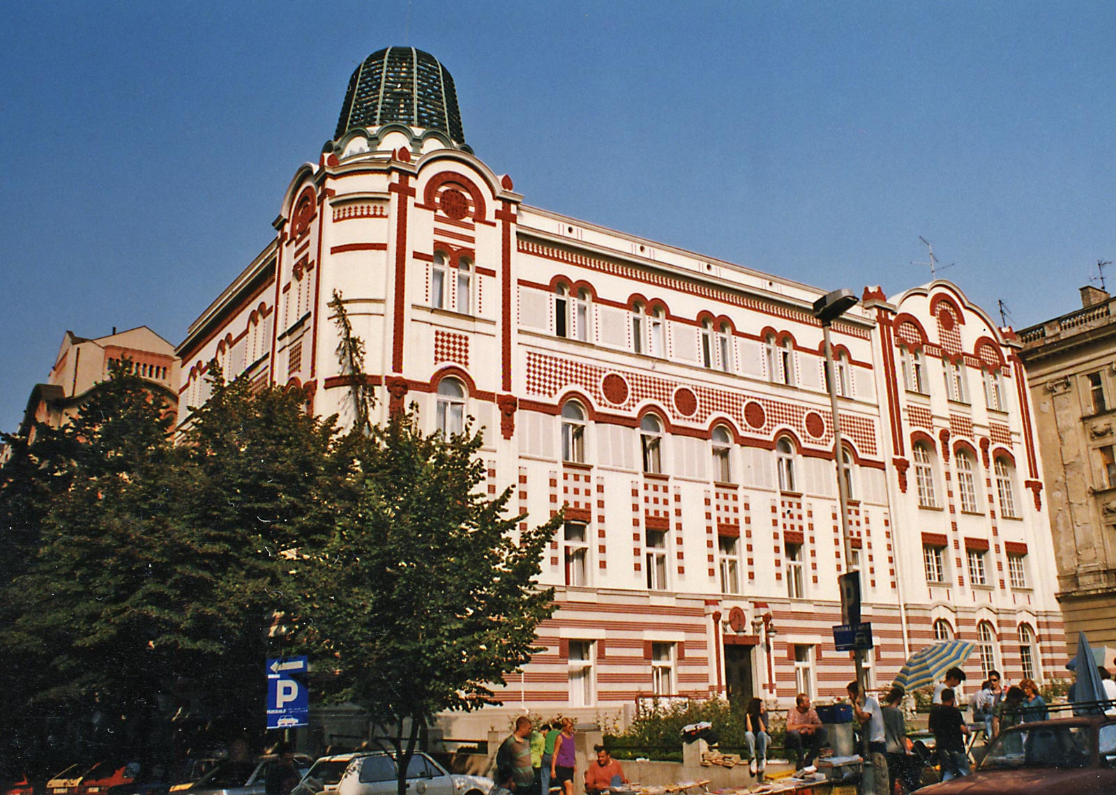 Прва српска телефонска централа 1905-1906, архитекта Бранко Таназевић, снимио Ранко Томић.